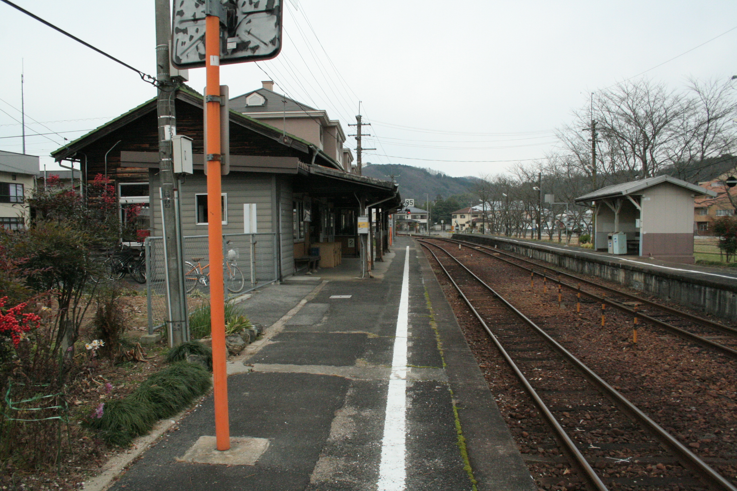 楢原駅方面(西側）より見た美作江見駅駅舎と上下線ホーム。